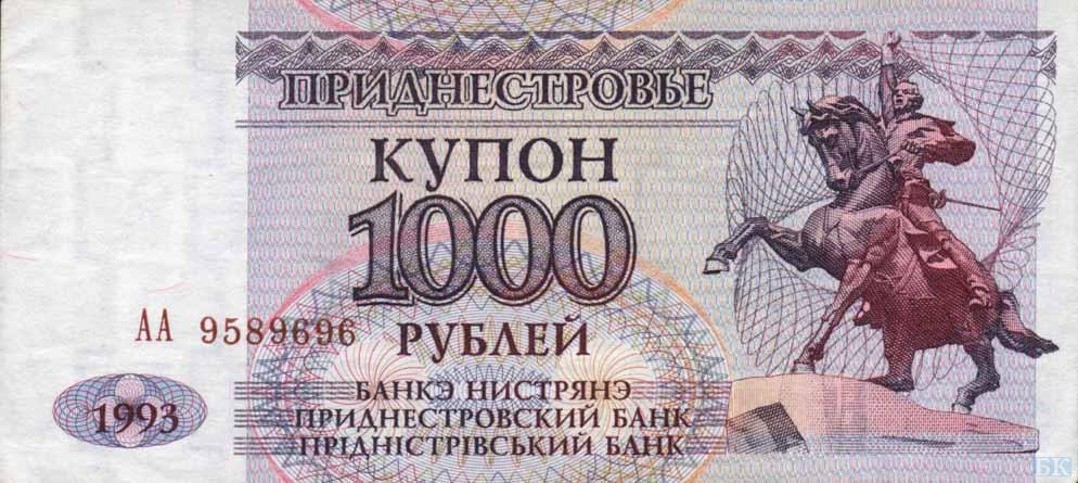 Transnistria 1000 rubles 1994 series